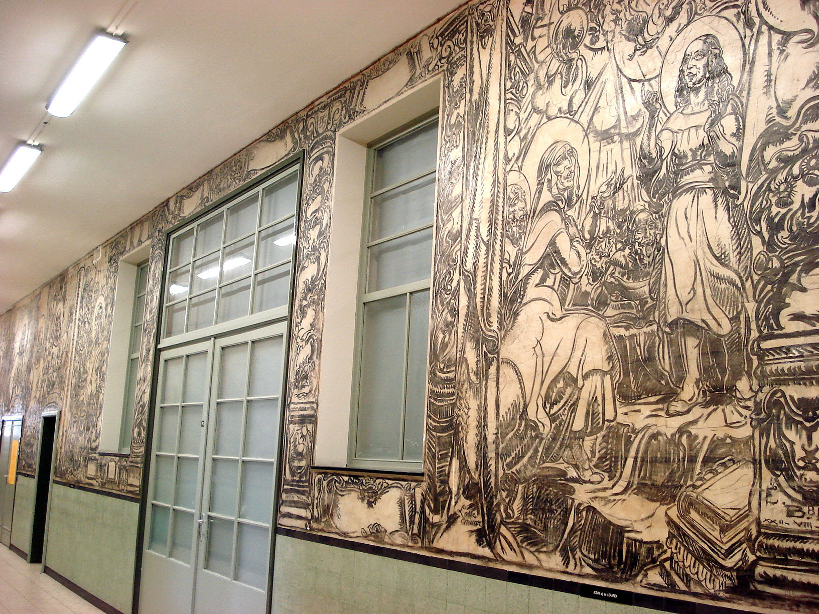 Alfred Ost. Muurtekeningen in Xaveriuscollege te Borgerhout (omstr. 1944).